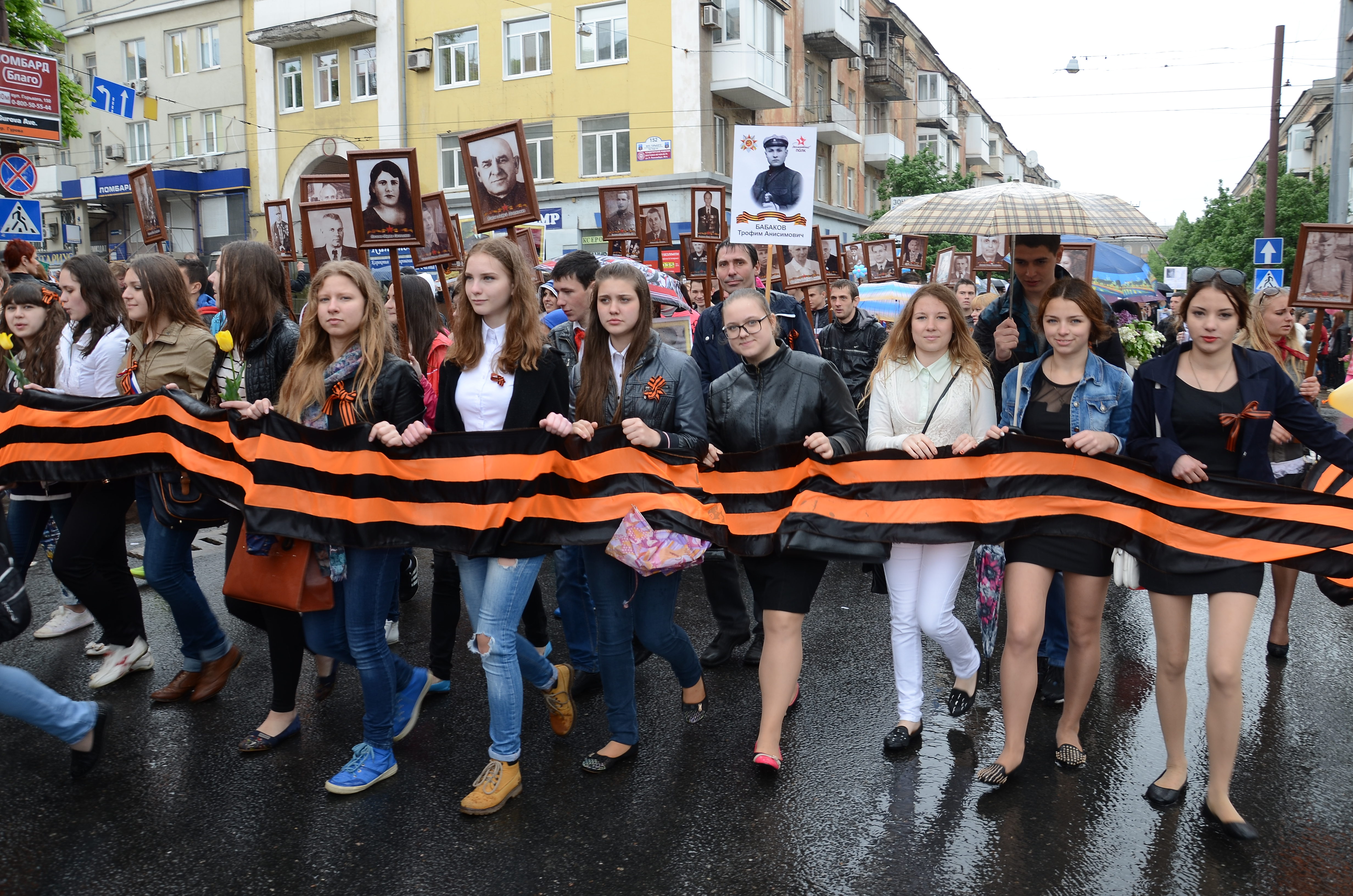 День Победы в Донецке